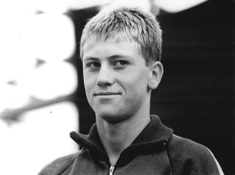 Matthias Pechmann Zentralbild Koch Sche 17.8.1968 Leipzig: Deutsche Meisterschaften der DDR im Sportschwimmen-Sieg für Pechmann über die Lagenstrecke (16.8.) Der Leipziger Matthias Pechmann (SC DHfK) erzielte über 4 00 Meter Lagen in 4:56,4 einen weiteren Deutschen Meistertitel für die Messestadt.